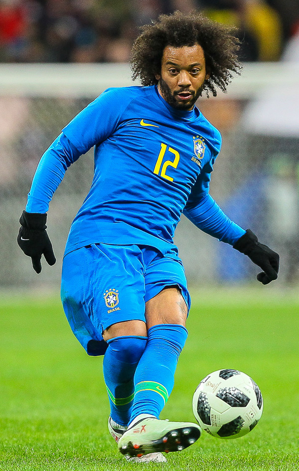 Россия проиграла Бразилии со счетом 0:3